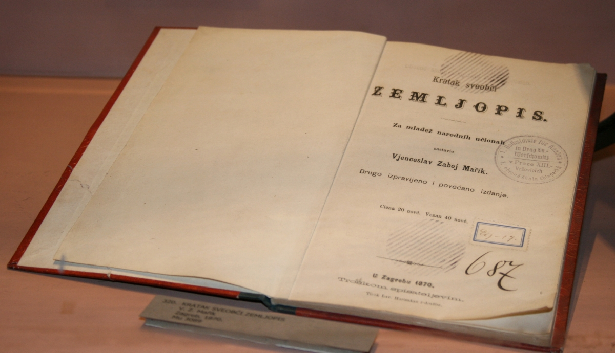 snimljeno tijekom Noći muzeja